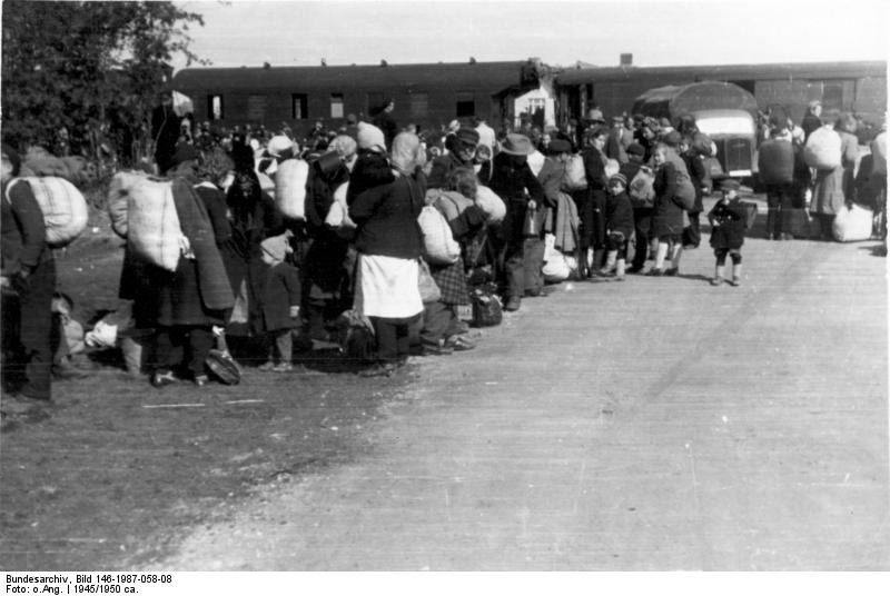 Ankunft von Flüchtlingen aus Ostpr. in Schleswig-Holstein (Bahnhof Meldorf).